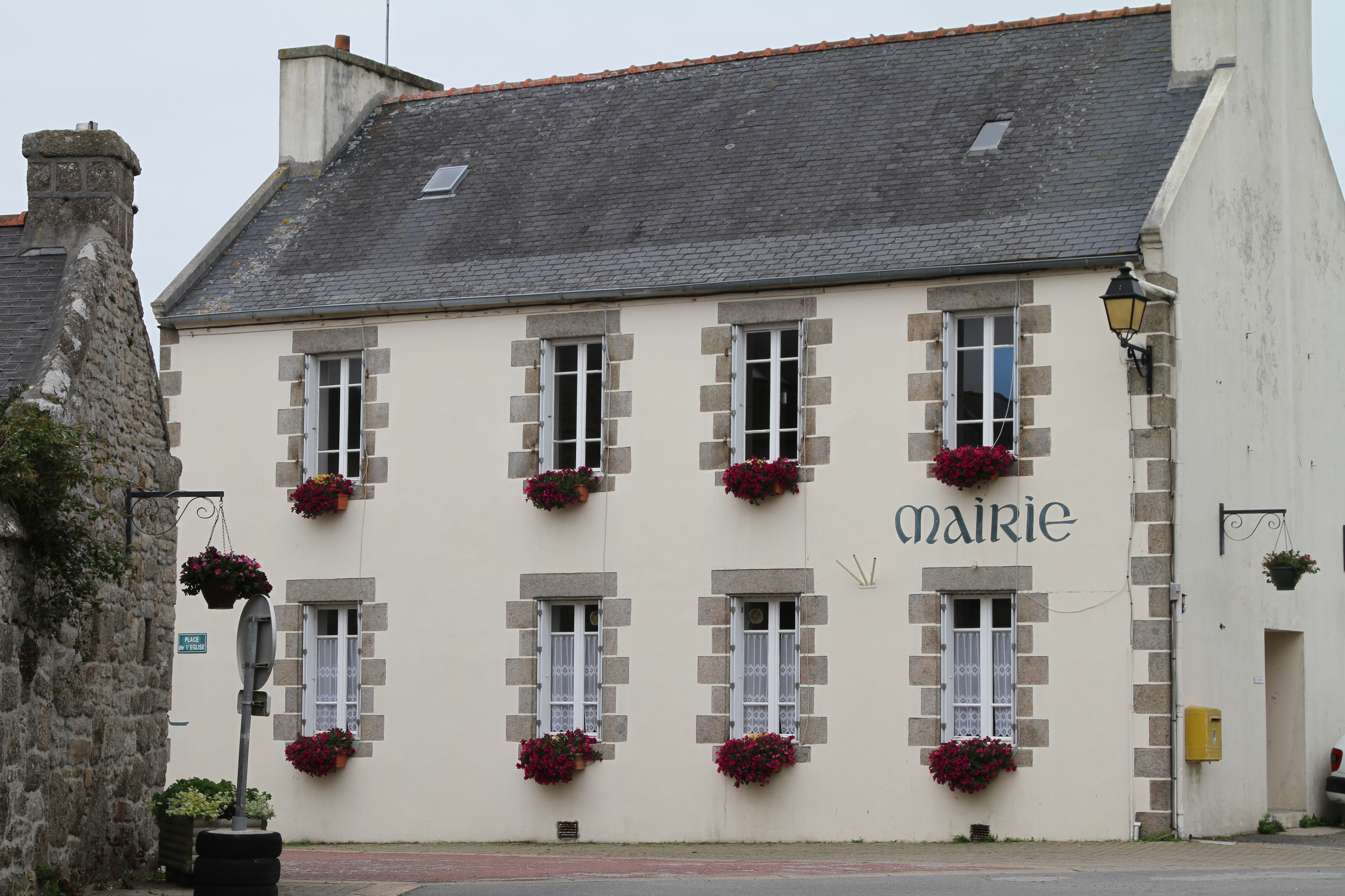 Mairie de la commune de Lanrivoaré